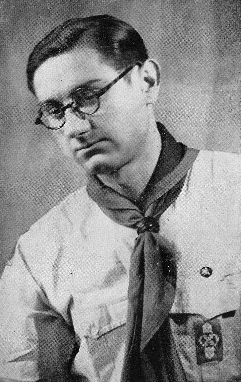 Guy de Larigaudie en 1932.